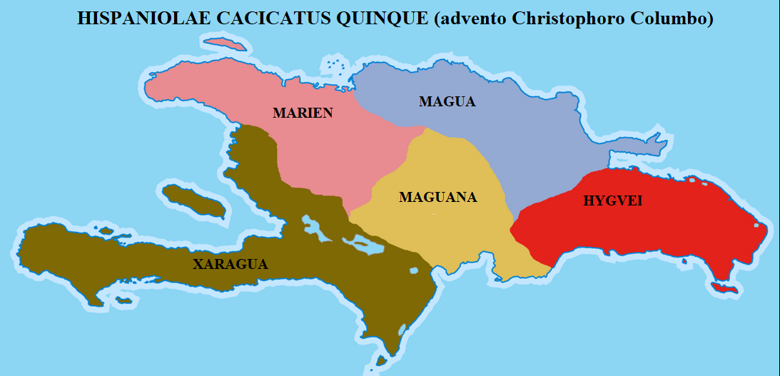 Hispaniolae cacicatus quinque Christophoro Columbo advento.